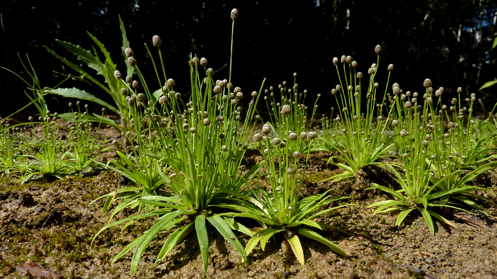 Paepalanthus myocephalus (Mart.) Körn